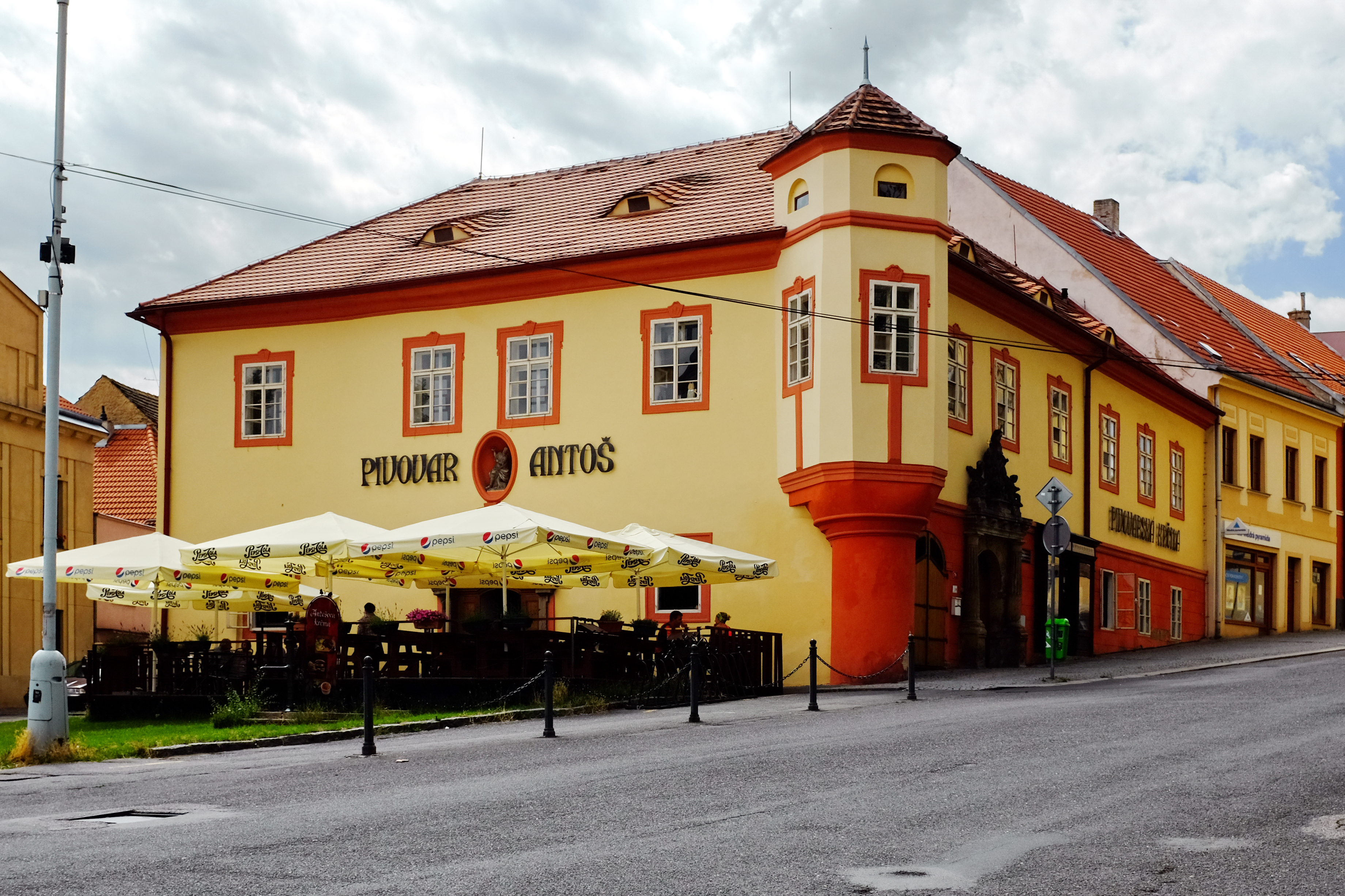 Modletický dům, Vinařického 14/10, Štechova, Slaný.